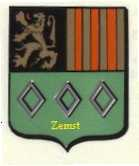 Het gemeentewapen van Zemst